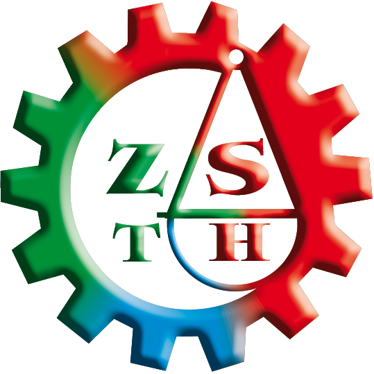 Logo Zespołu Szkół Technicznych i Handlowych w Bielsku-Białej